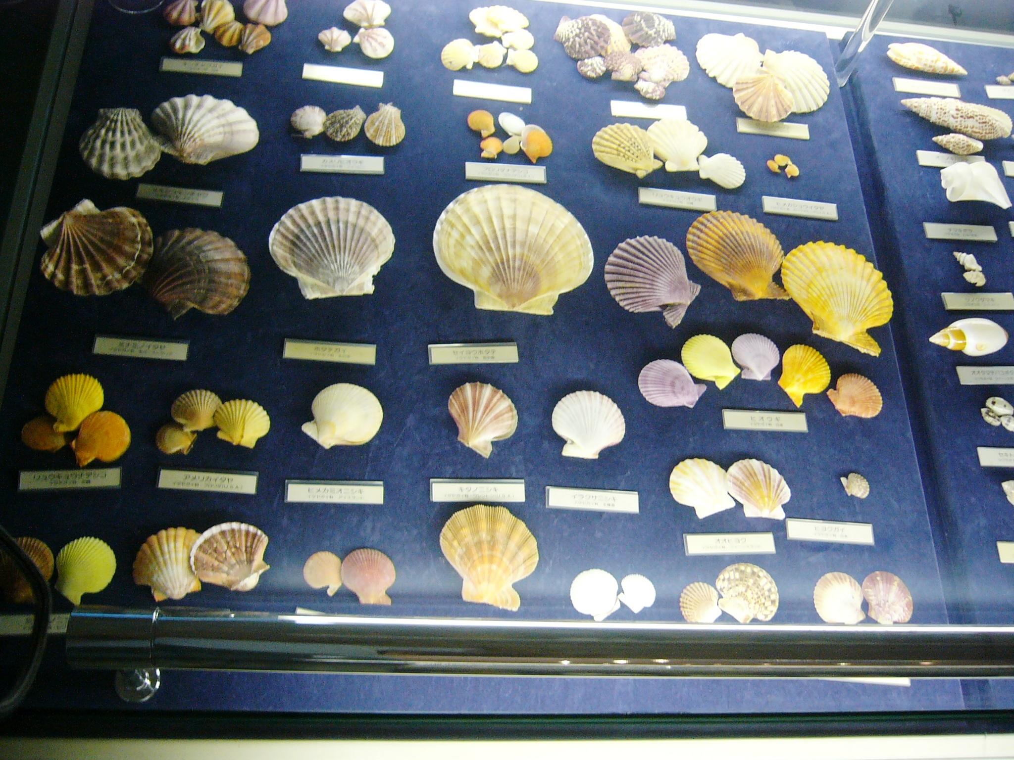 Музей раковин в Гамагори